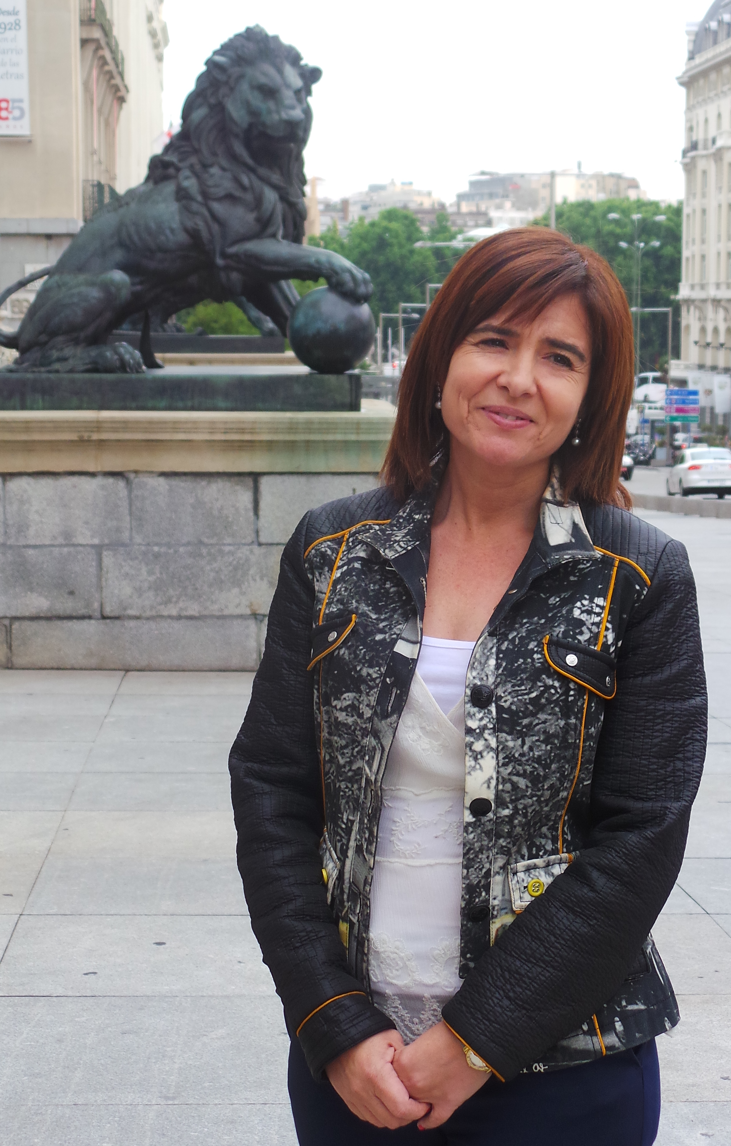 En la puerta del Congreso de Diputados